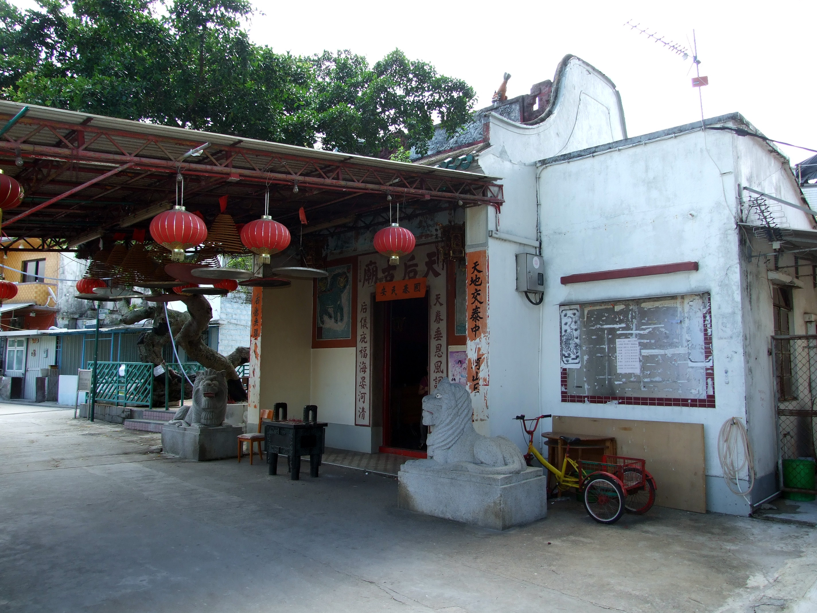 中文（香港）: 榕樹灣天后廟